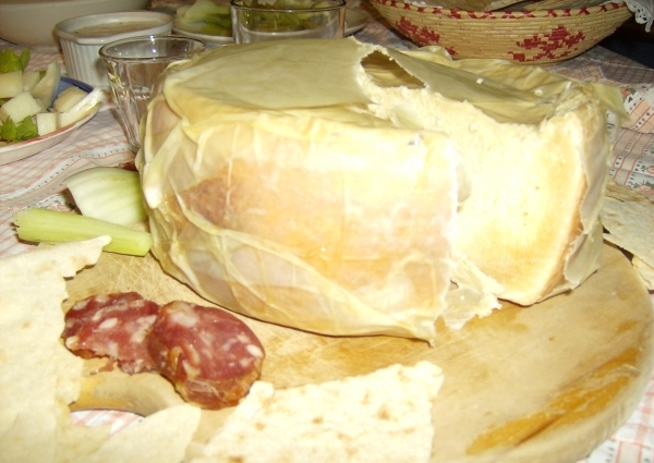 Casu marzu, rotte Sardijnse schapenkaas